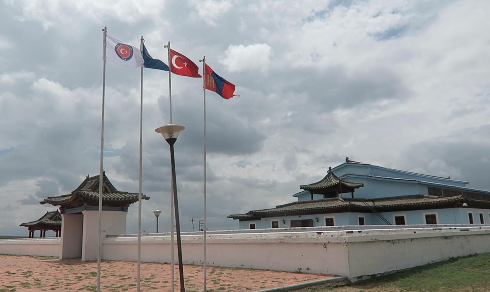 Orhun Yazıtları Müzesi